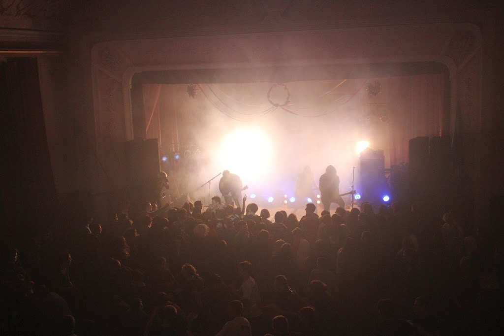 Фотографія з Рок-Шторму м. Івано-Франківськ